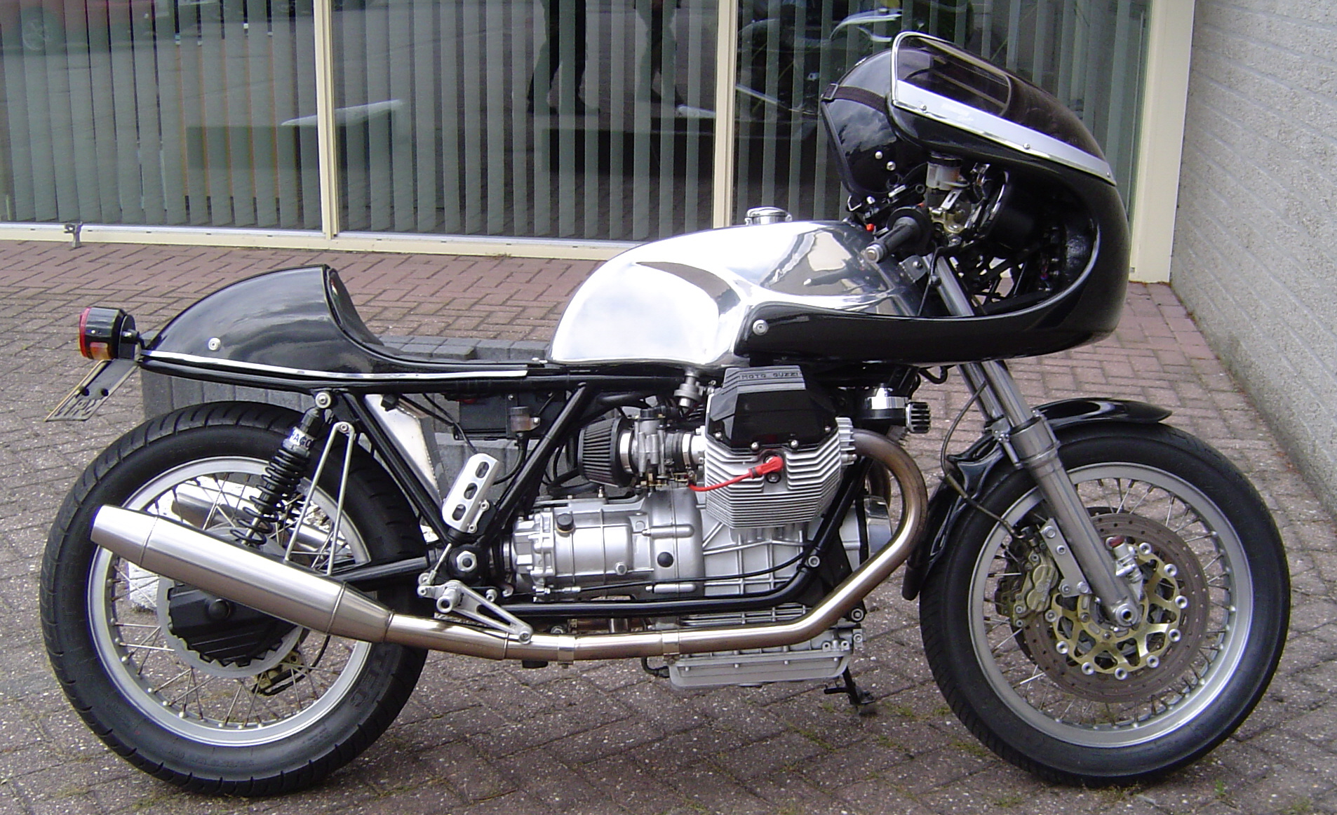 Moto Guzzi V 1100 Cafe Racer